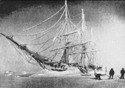 Die Belgica bei der Antarktisexpedition 1897-1899